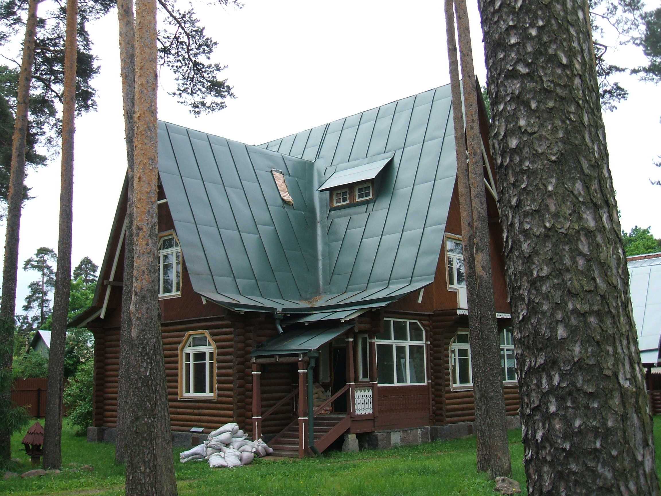 Ольгино СПб памятник культурного наследия